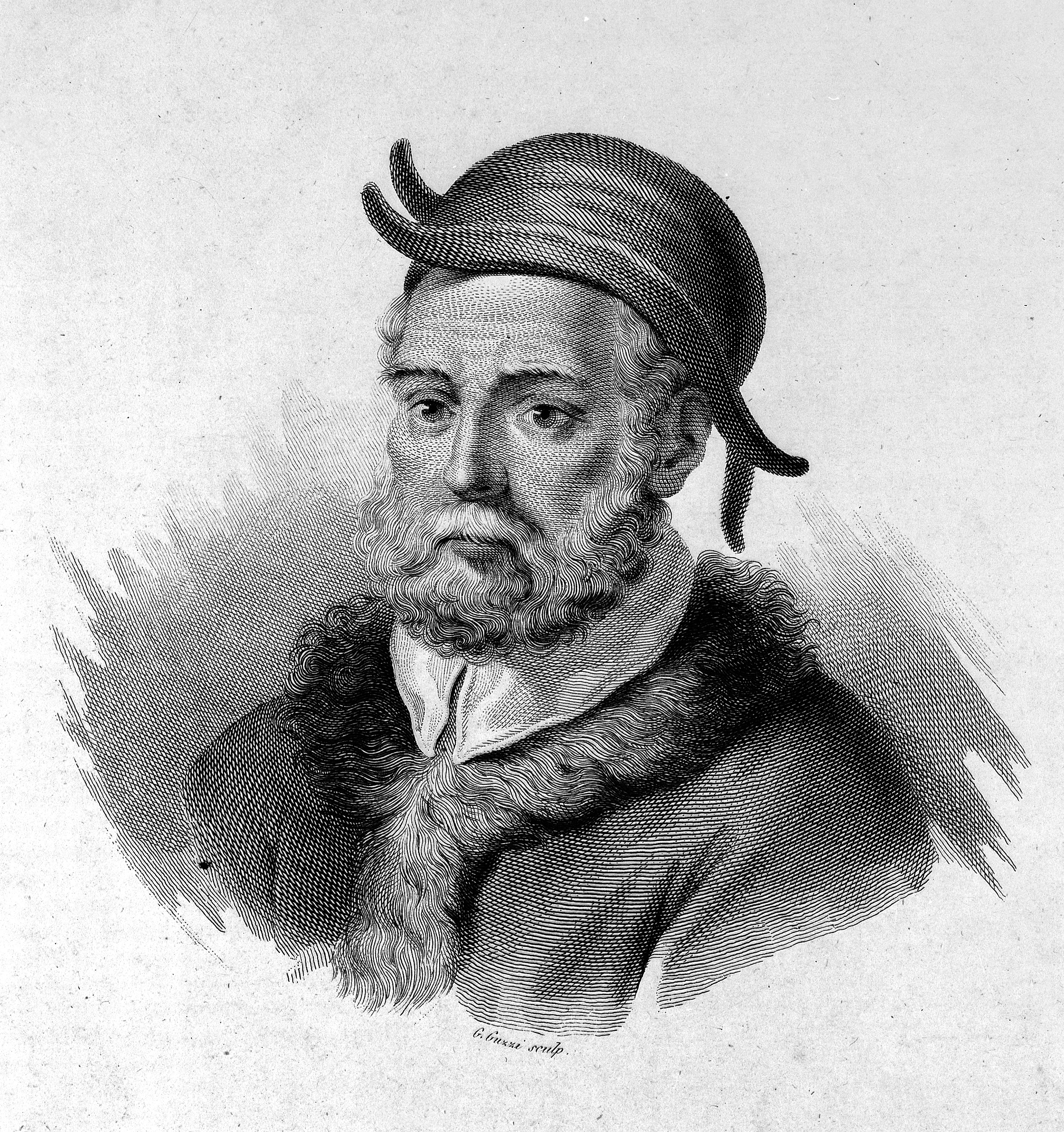 Portrait Andrea Cesalpino